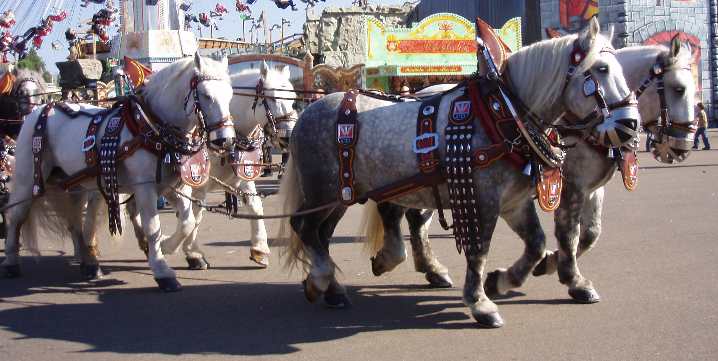 Sechsspänner auf dem Cannstatter Volksfest